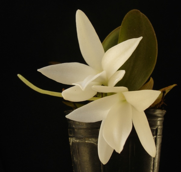 Aerangis fastuosa 001